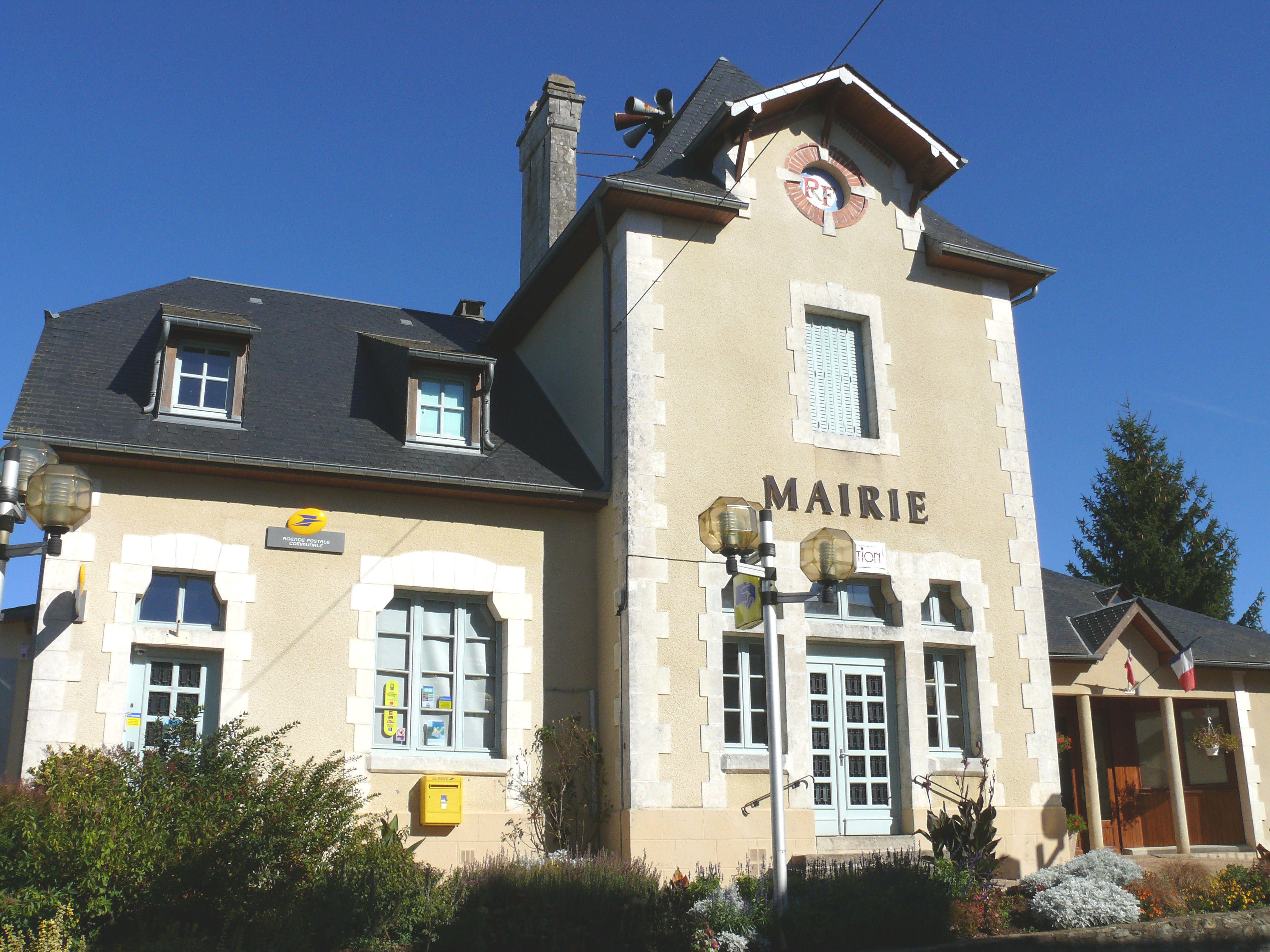 Soursac - Mairie